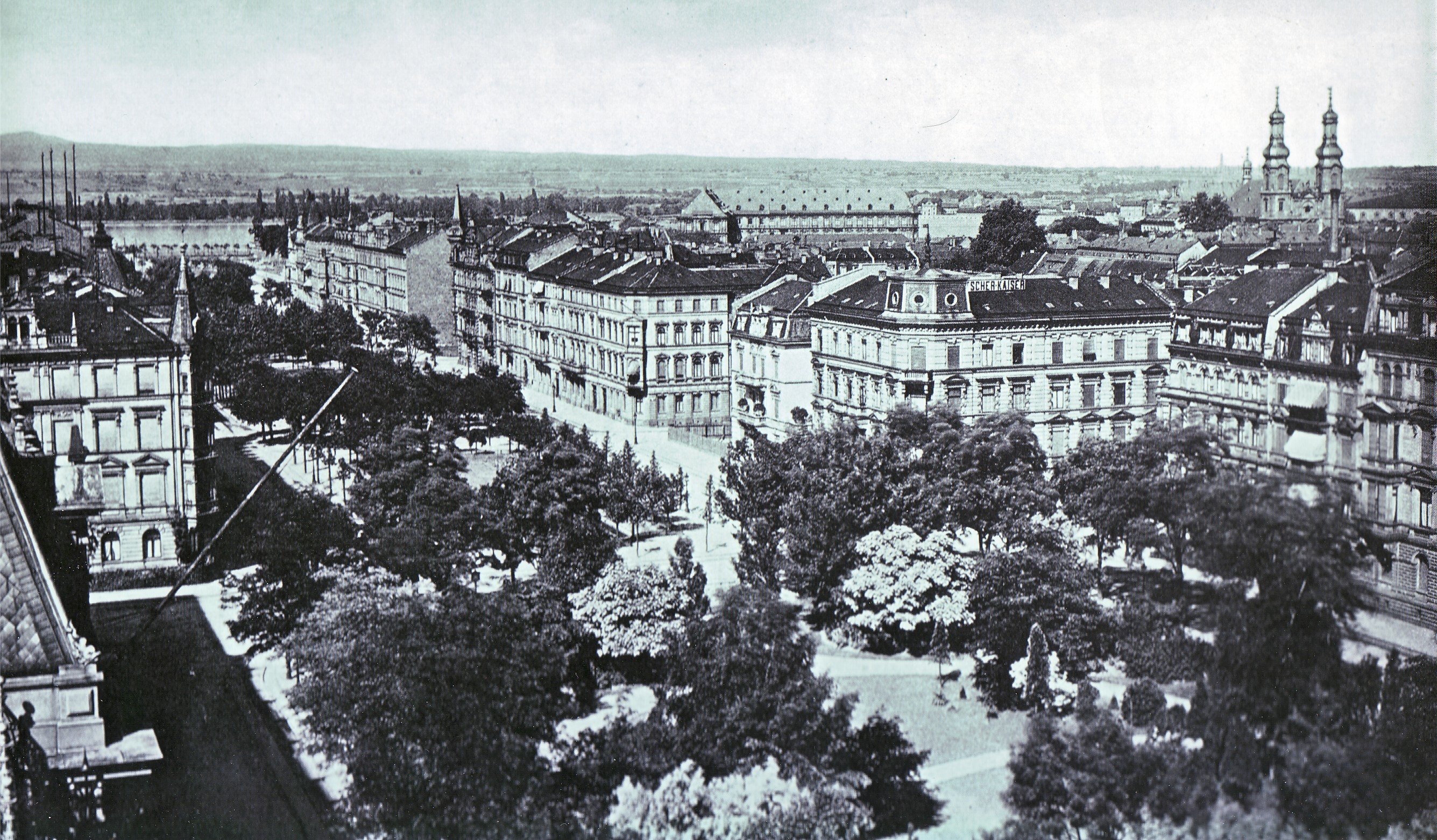 Kaiserstraße 1892 - ein Jahrzehnt vor dem Bau der Christuskirche, rechts das Bleichenviertel und die Neubrunnenstraße.